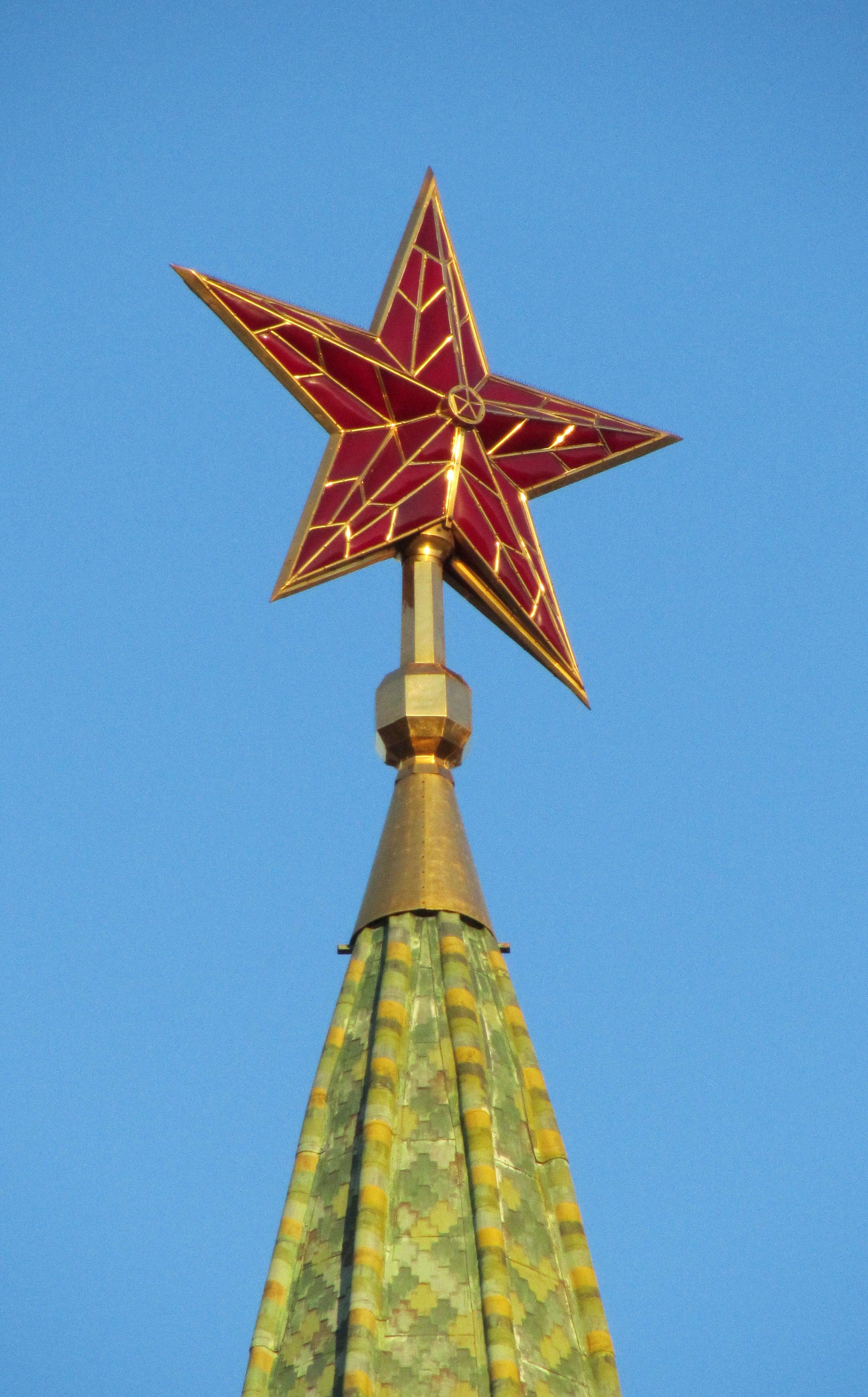 Звезда установлена осенью 1935 г. советской властью.